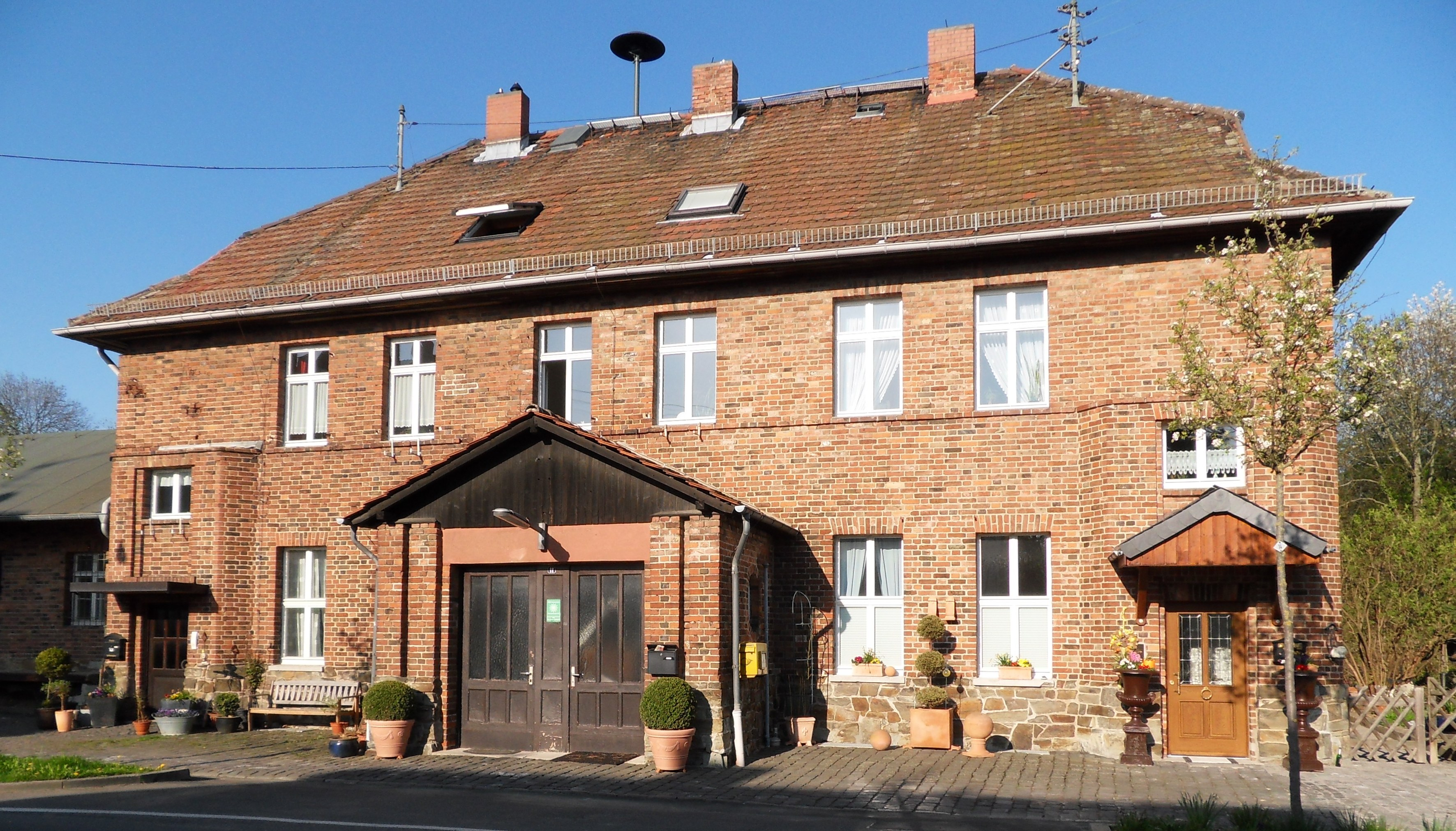 Bahnhof Igstadt an der Ländchesbahn, Blick von der Hinterbergstraße. Das Gebäude ist in privaten Händen